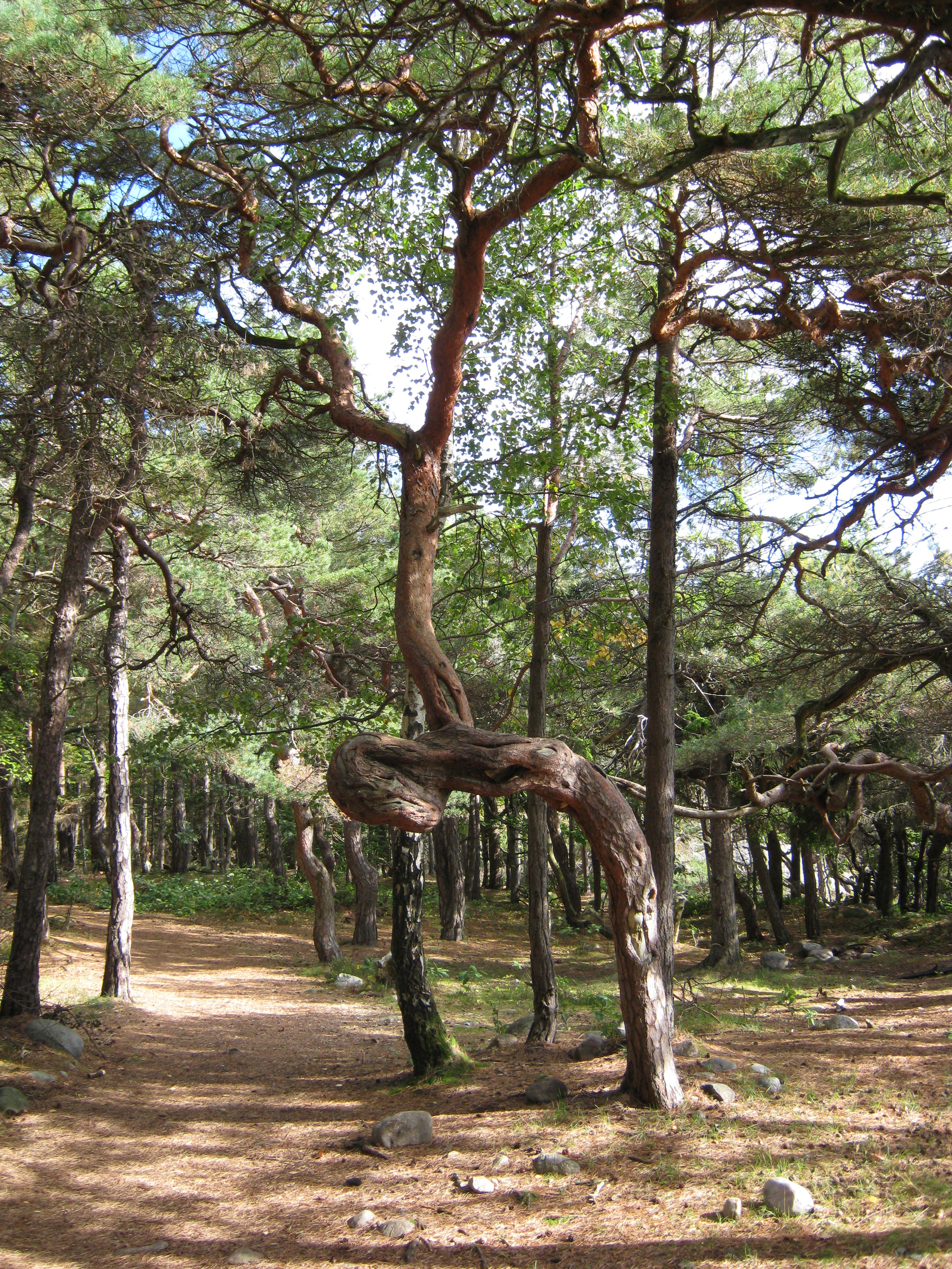 Typiske kroktre i Hoveskogen i Arendal